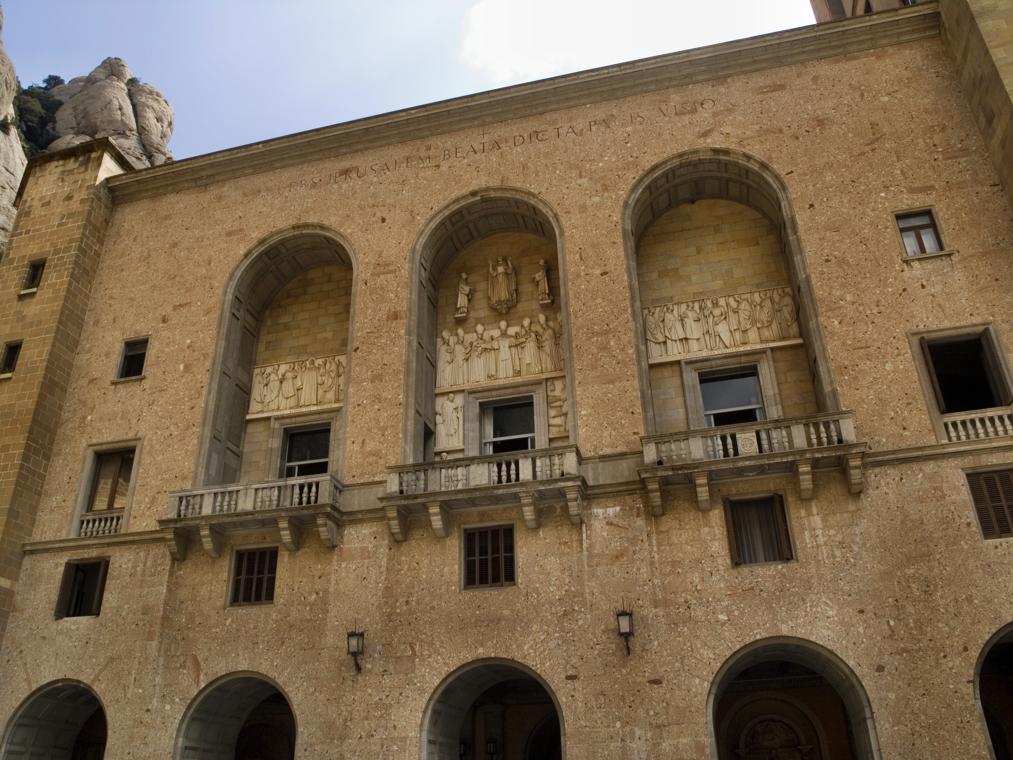 Каталония, монастырь Монсеррат – аркада перед атриумом